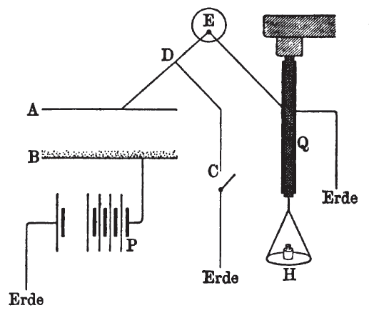 Marie Curies Messanordnung: A, B Plattenkondensator (Platte B mit radioaktiver Probe) C Schalter P Batterie E Elektrometer Q piezoelektrischer Quarz H Schale für Gewichte